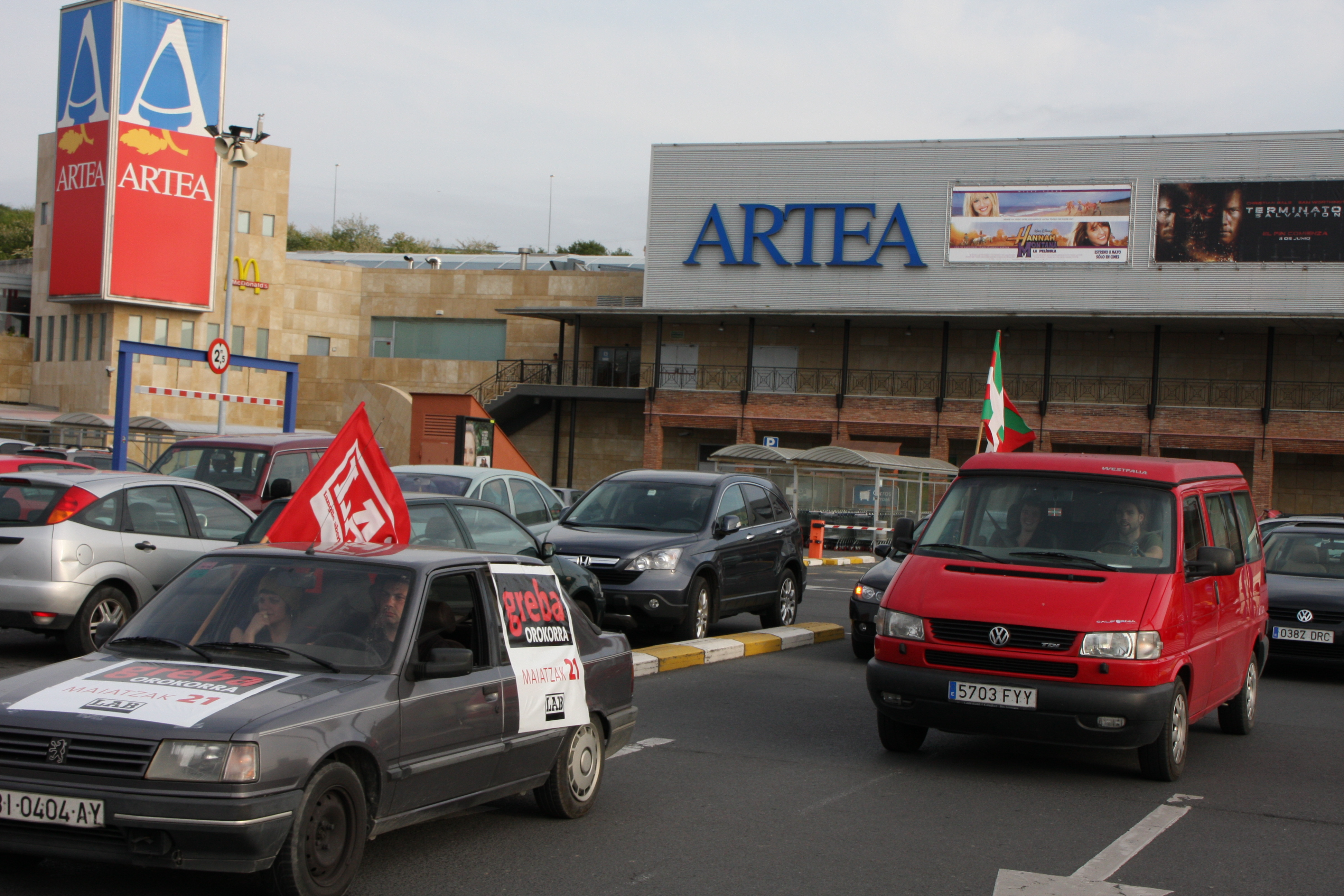 Artea merkataritza-zentroaren kanpoaldea.